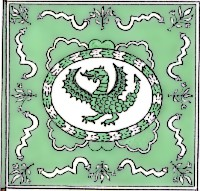 Bandiera della magistratura dei Dragoni del Gioco del Ponte di Pisa